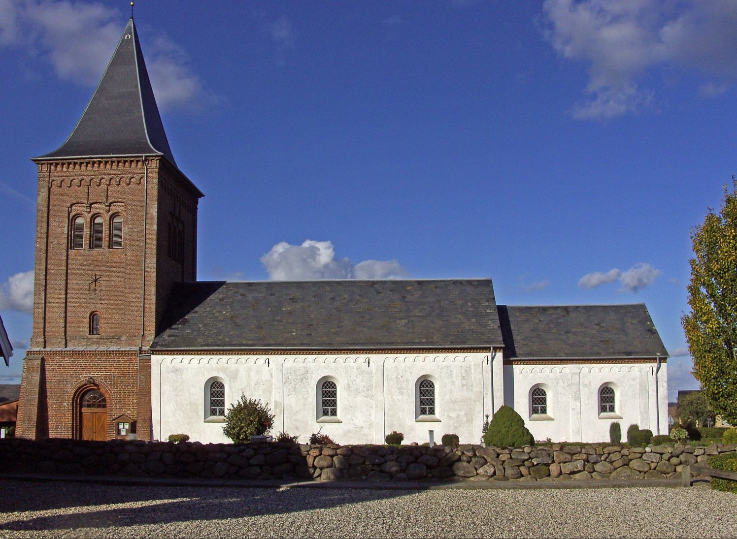 fra syd